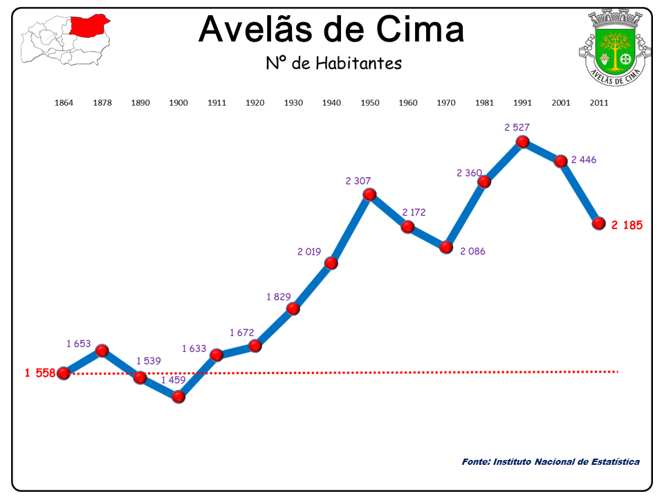 Freguesia